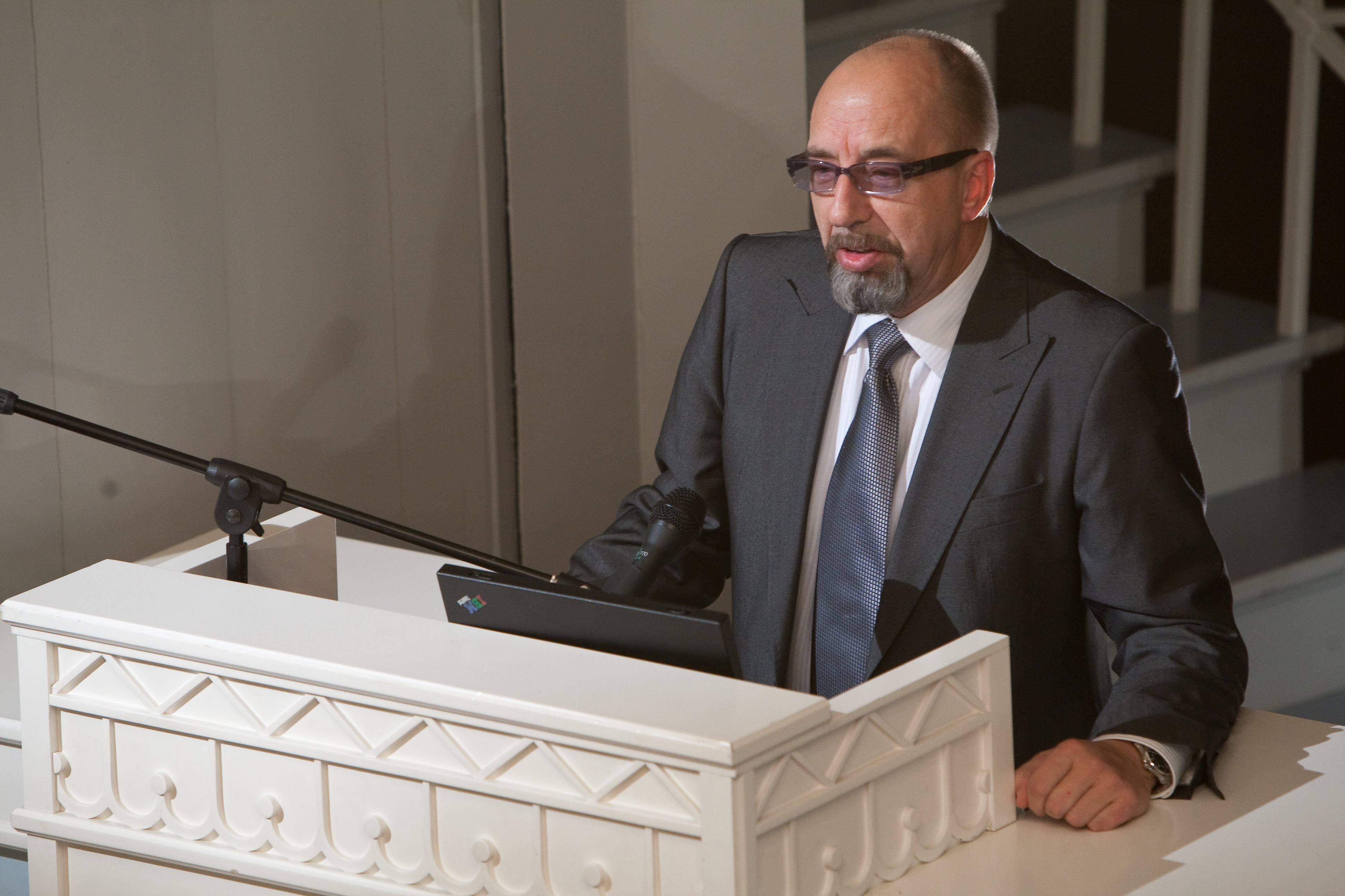 Rahvusülikooli 90. aastapäeva tähistamine. Professor Peeter Saari esinemas konverentsil "Eestikeelne ülikool" ettekandega "Eesti keel ja füüsika" Tartu Ülikooli aulas 3. detsembril 2009.